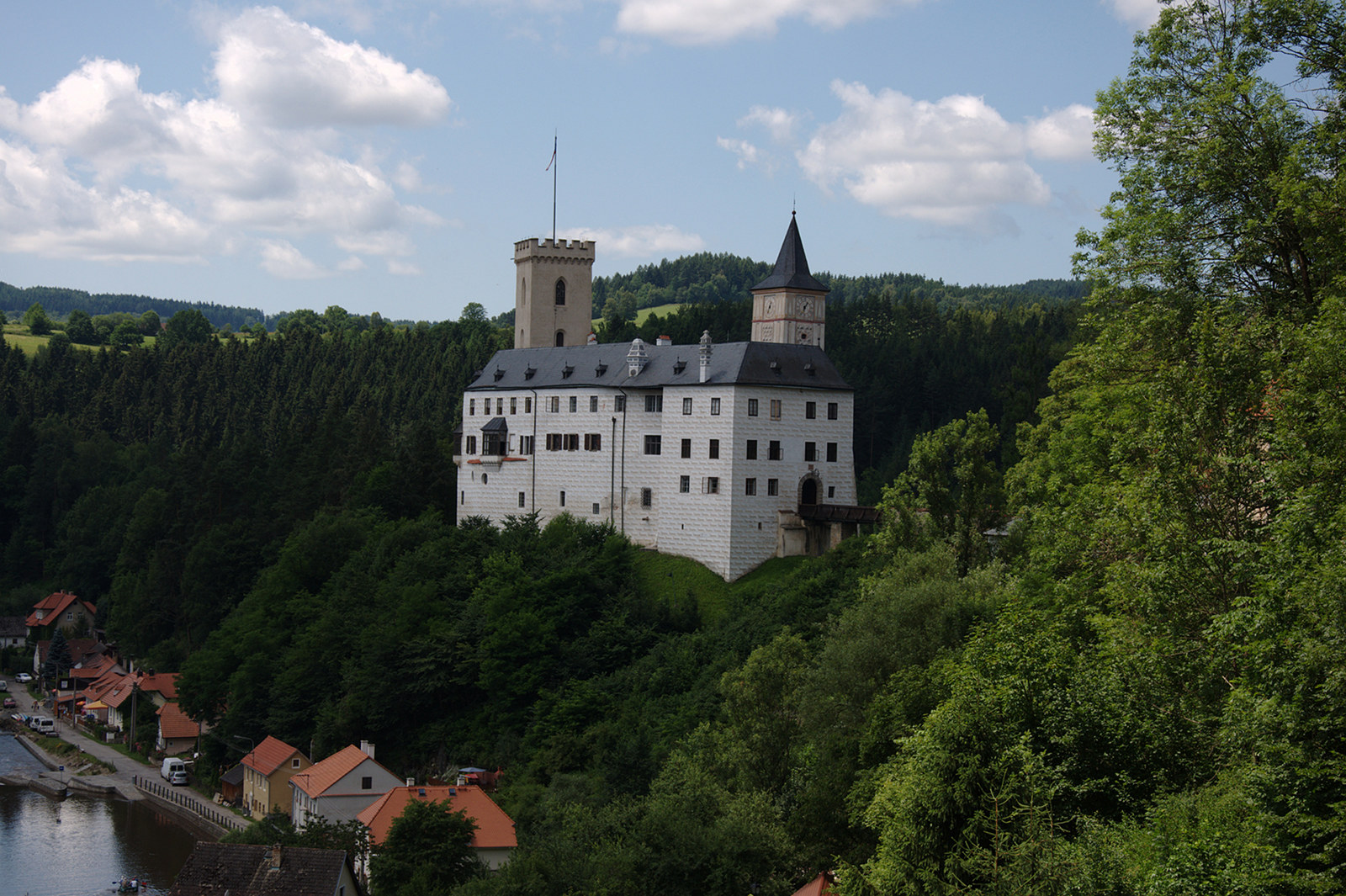 Státní hrad Rožmberk nad Vltavou